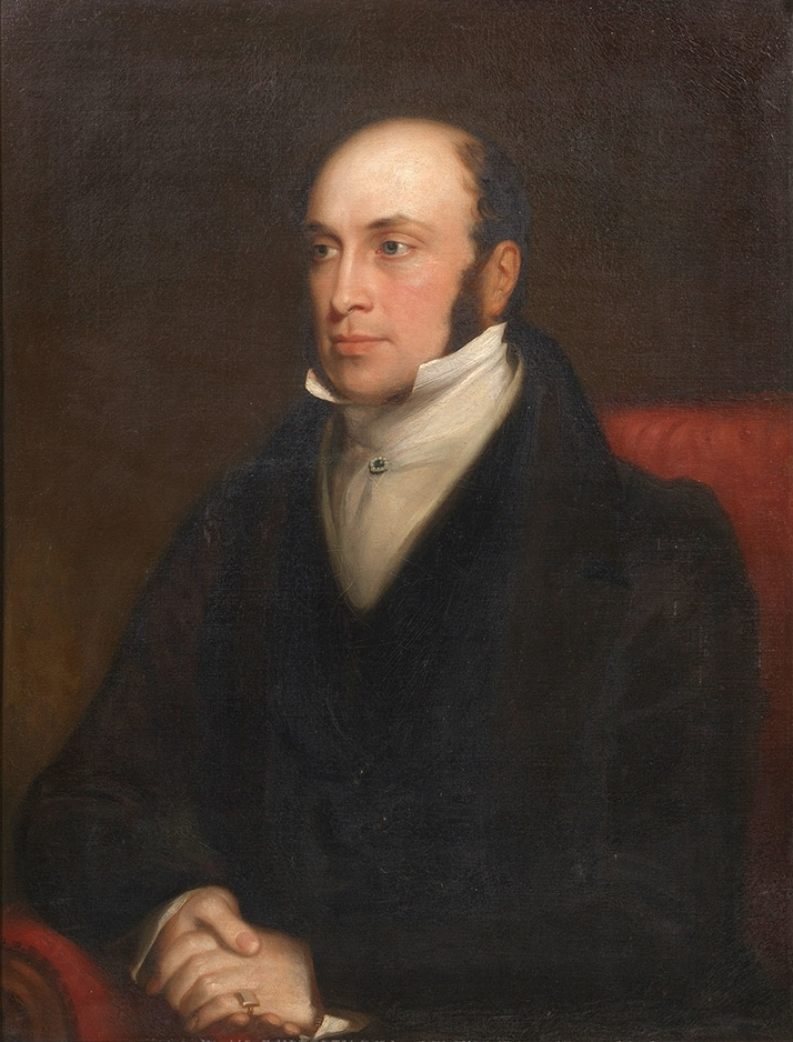 Portrait of a gentleman. Oil on canvas, 88 x 68 cm